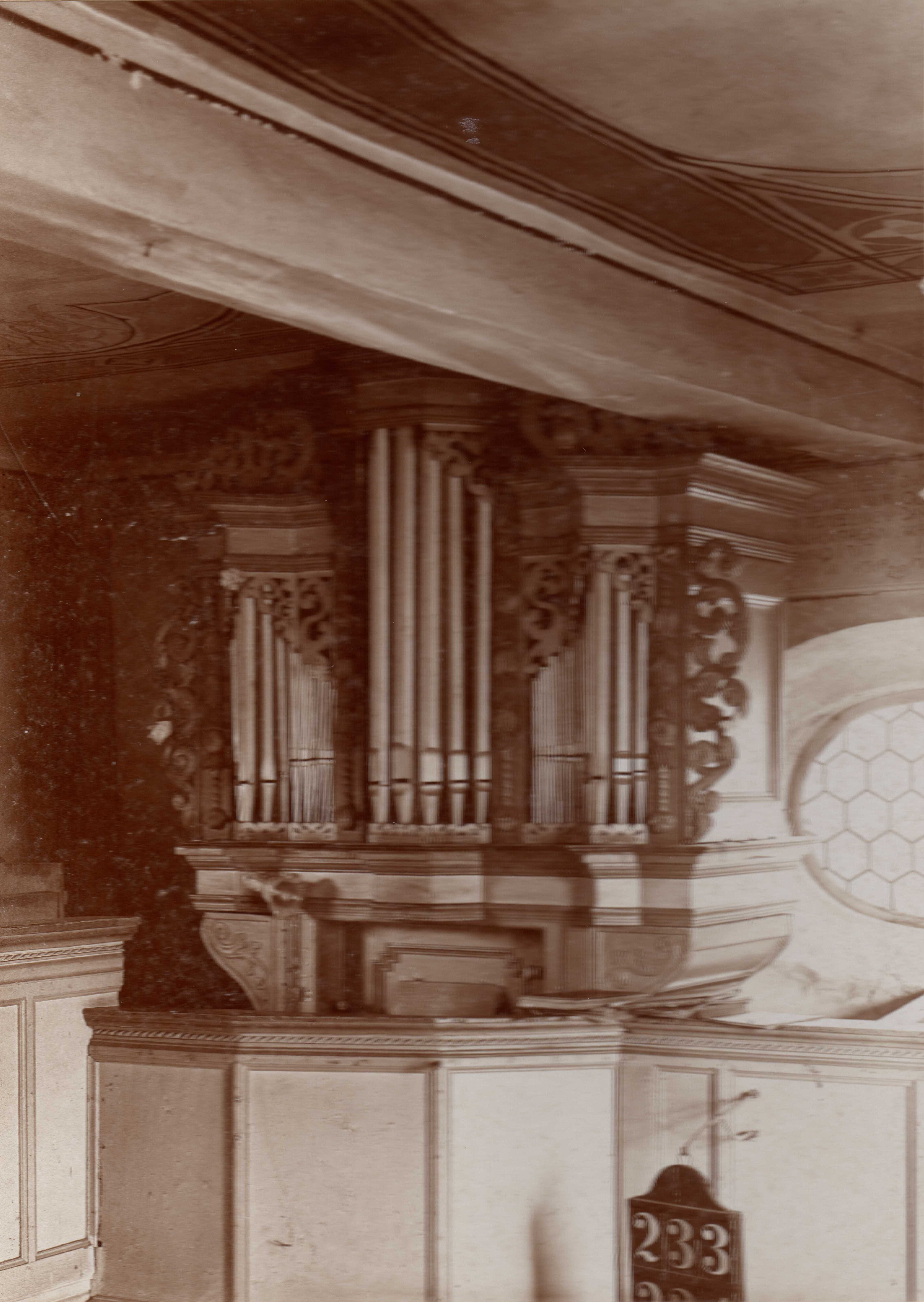 Orgel der Evangelischen Kirche Hochelheim, Hüttenberg, Lahn-Dill-Kreis, Hessen, Deutschland